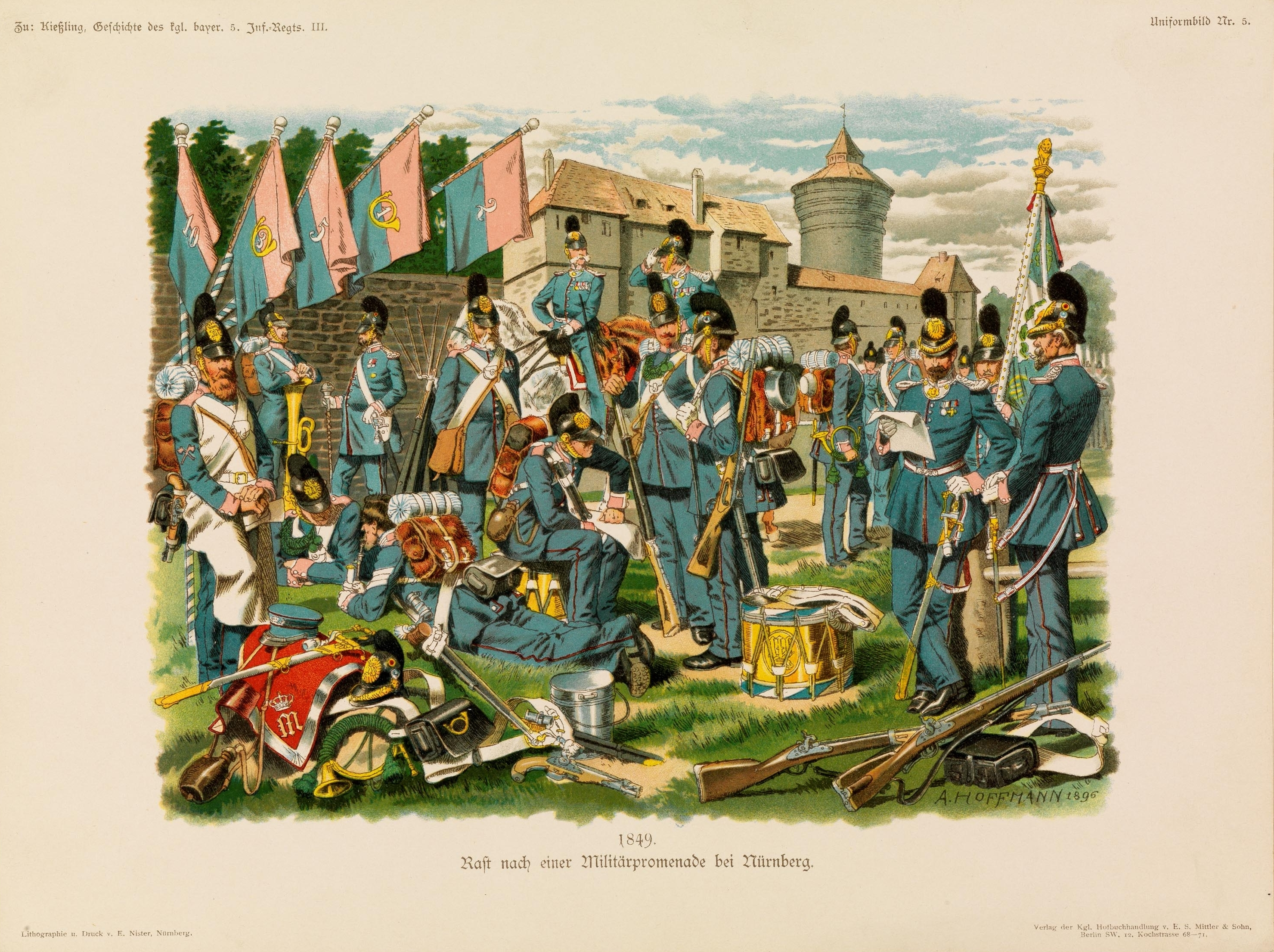 Uniform-Bilder zur Geschichte des Königl. Bayer. 5. Infanterie-Regiements Grossherzog Ernst Ludwig von Hessen. Lithographie und Druck v. E. Nister, Nürnberg. Verlag der Kgl. Hofbuchhandlung v. E. S. Mittler & Sohn, Berlin.